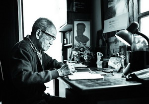 Nhà văn Vũ Ngọc Bình